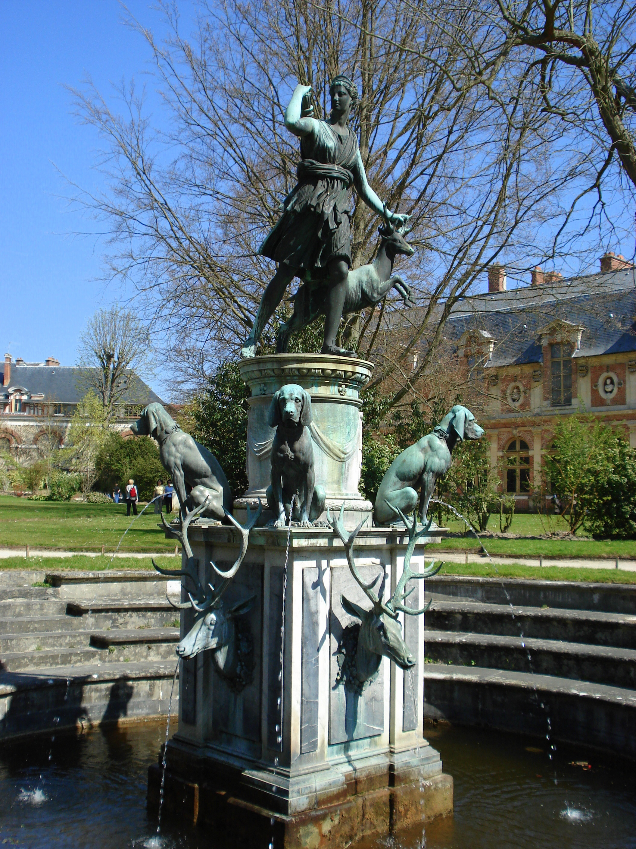 Schloss Fontainebleau, Dianabrunnen